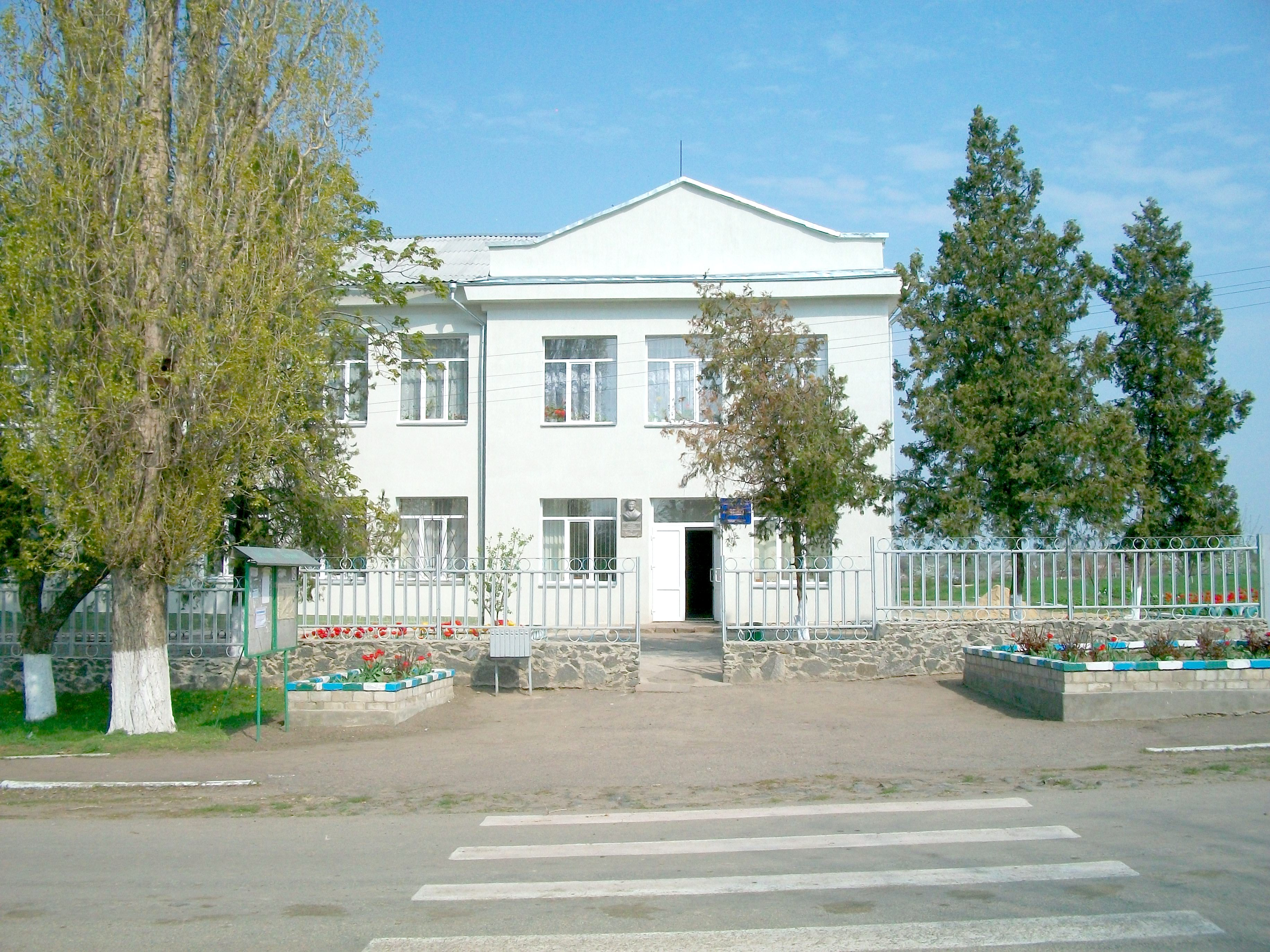 Білоусівська школа, 2016 рік